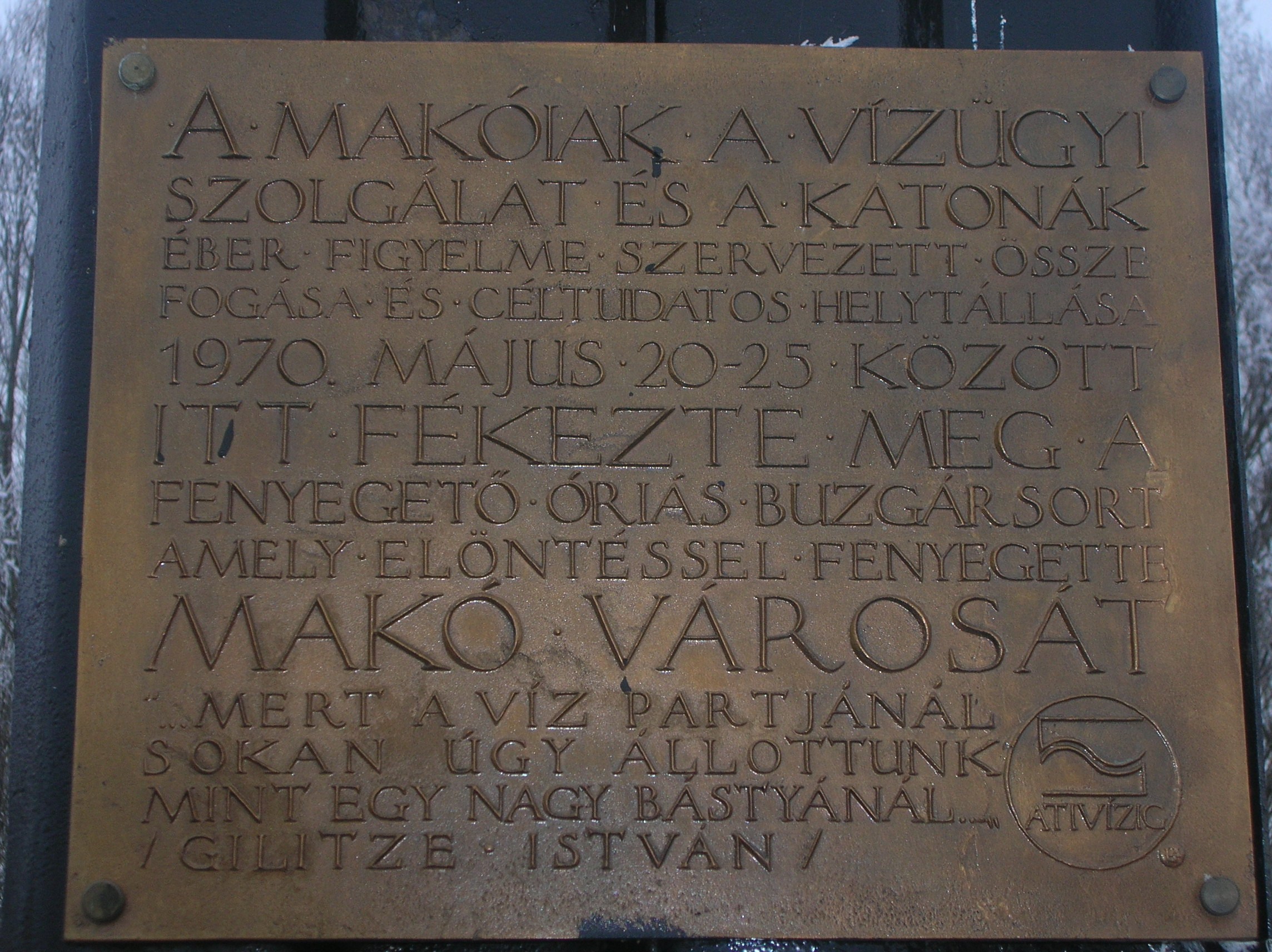 A '70-es árvíz emlékére a Makó-Landori erdő mellett (ahol az óriásbuzgárt megállították) állíott emlékmű felirata.